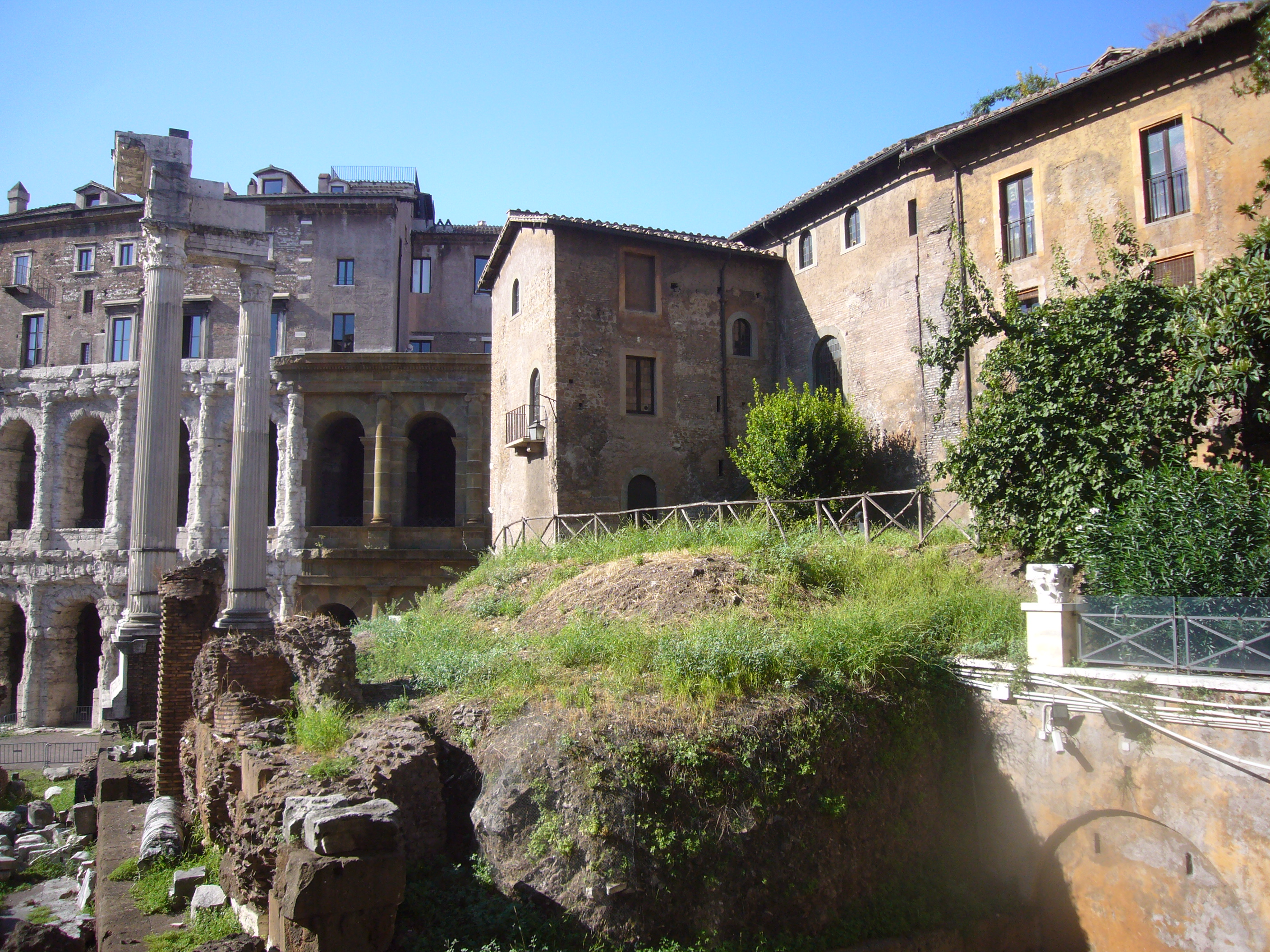 Roma, vista dell'area del teatro di Marcello, templi di Apollo Sosiano e Bellona e albergo della Catena, dietro il teatro di Marcello